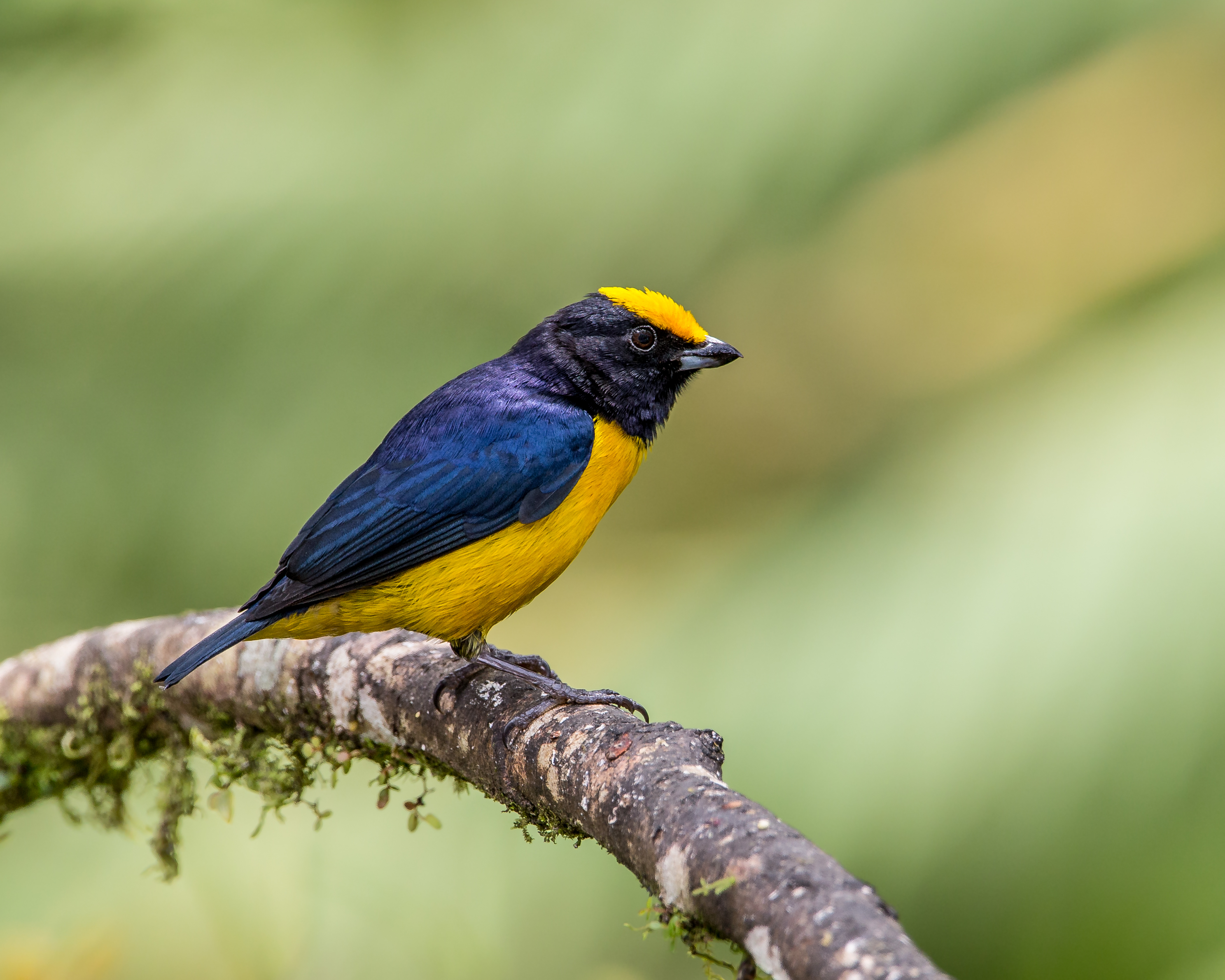 Taken at Tandayapa Bird Lodge, Ecuador.